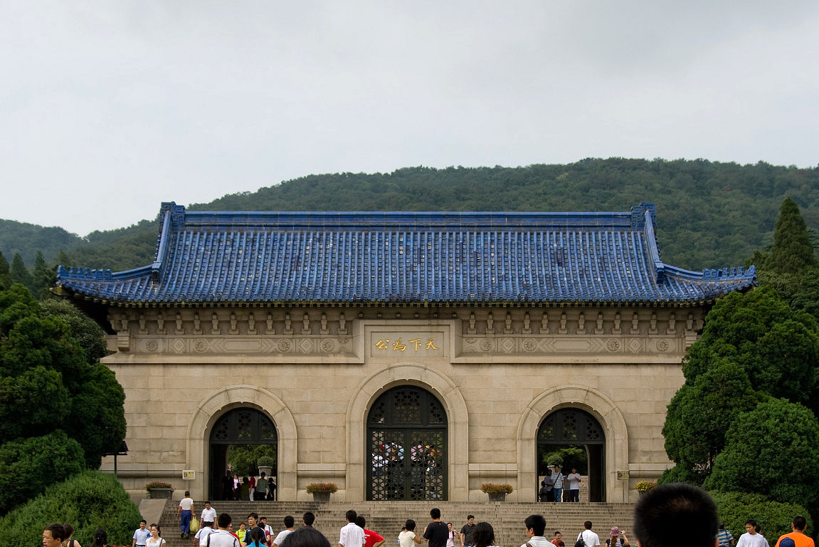 中山陵陵门